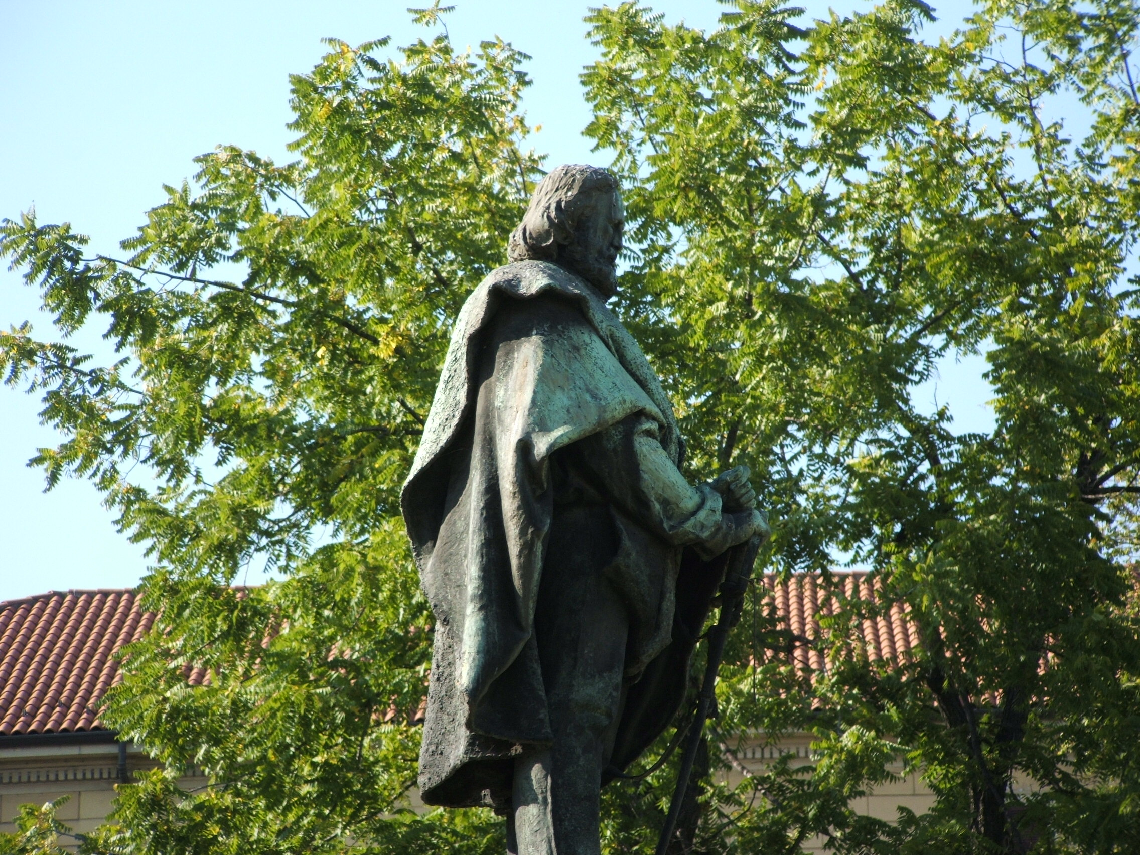 Monumento a Giuseppe Garibaldi a Novara, fusa da Enrico Braga nel 1886.